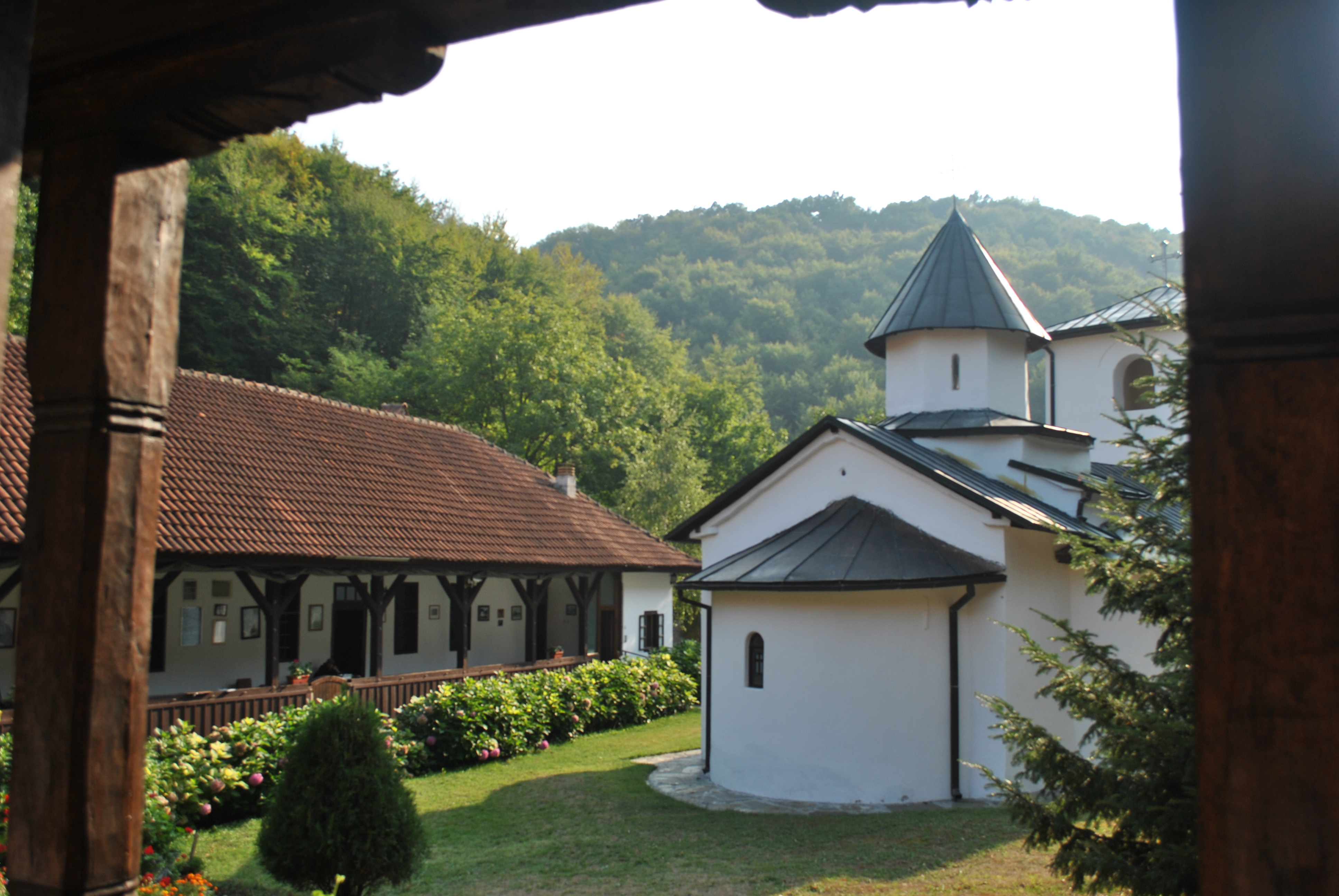 sediste prve srpske vlade, PRAVITELJSTVUJUSCEG SOVJETA